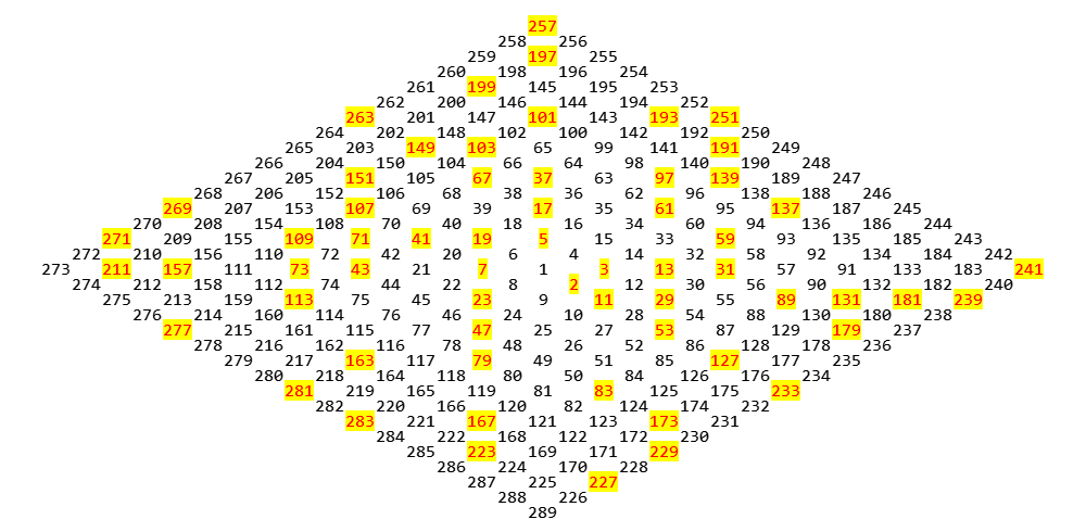 Diese Transformation der Ulam-Spirale macht deutlich, dass jede zweite Zeile gerade bzw. ungerade Zahlen aufführt. Hiermit erscheint es als sehr wahrscheinlich, dass sich Primzahlen auf Diagonalen verteilen.